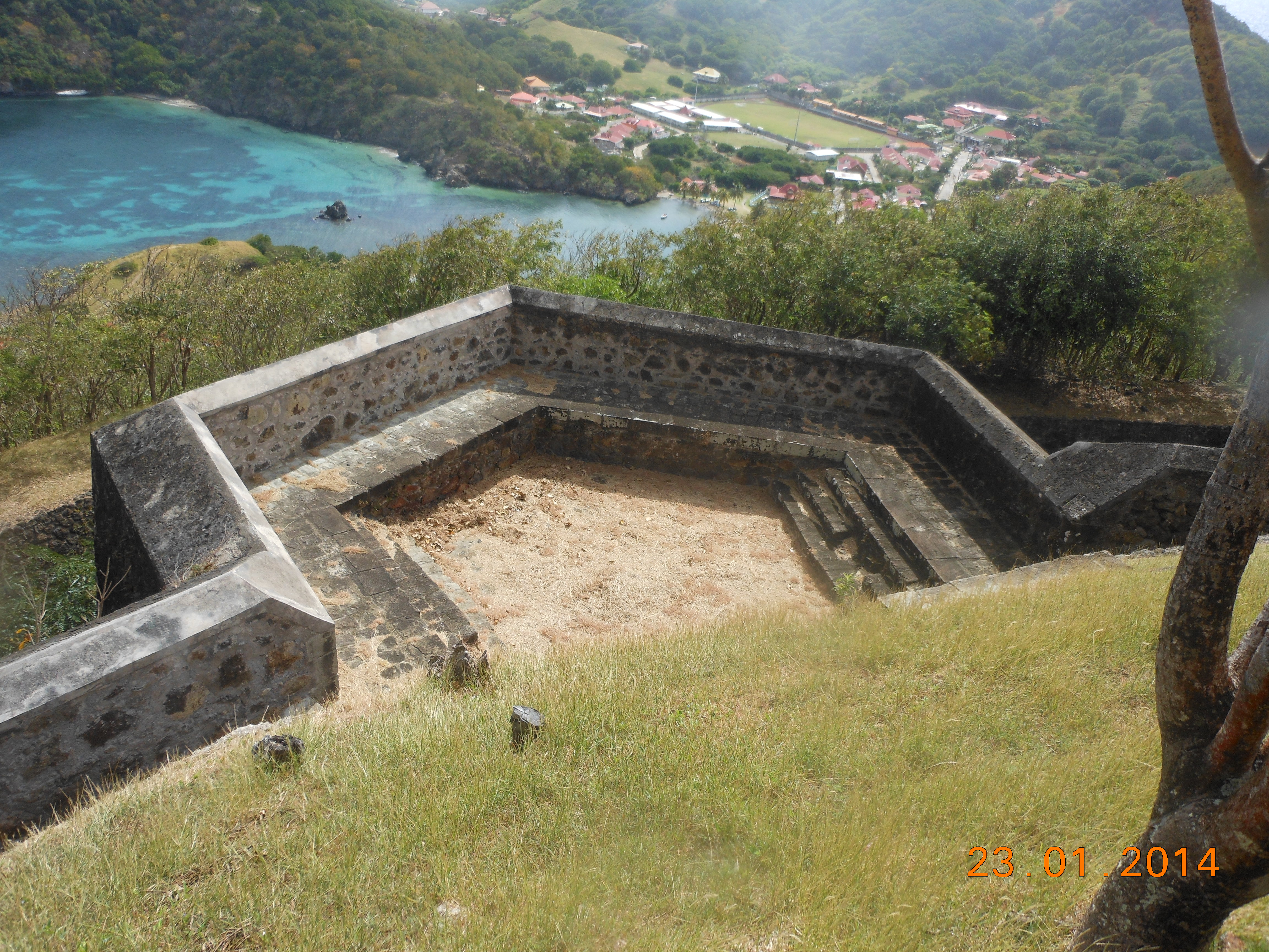 Vue du dessus d'un bastion